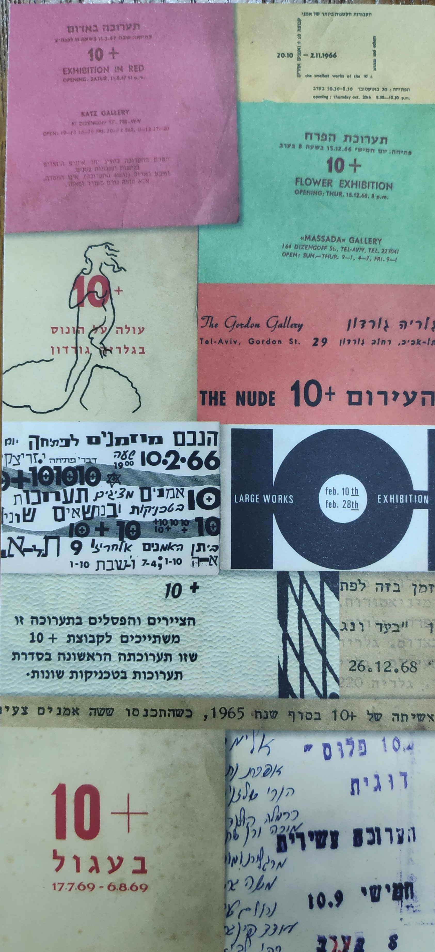 מתוך האוסף של בנו כלב